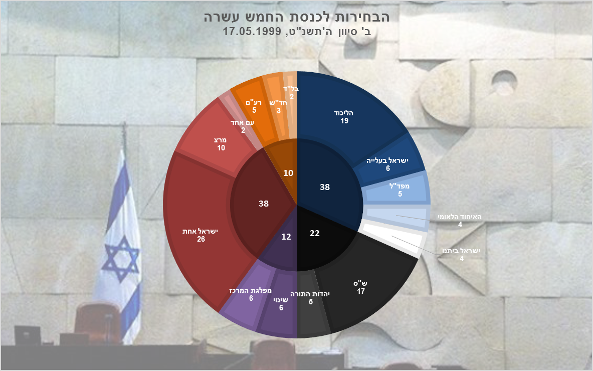 תוצאות הבחירות לכנסת החמש עשרה